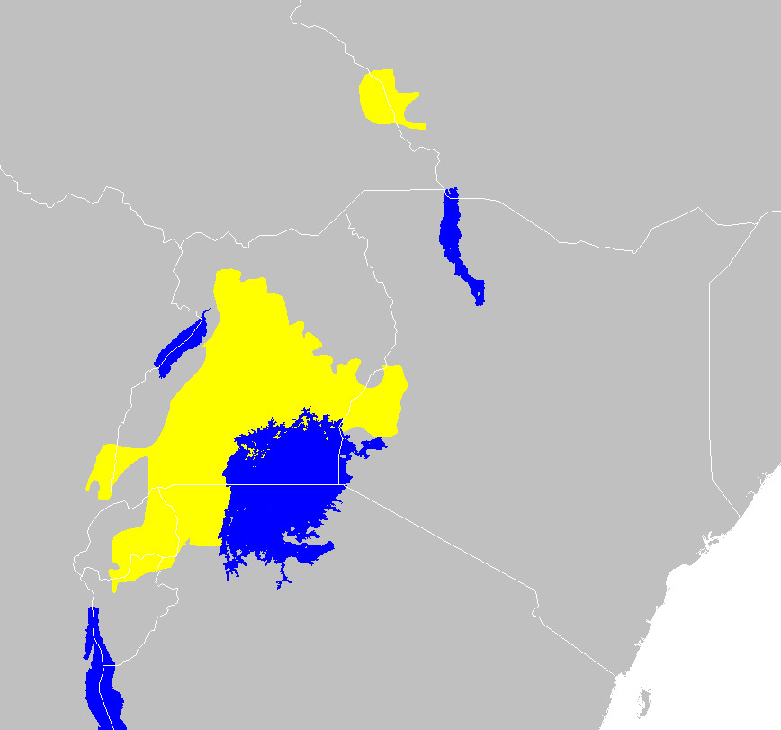 Victoria Basin forest-savanna mosaic ecoregion map